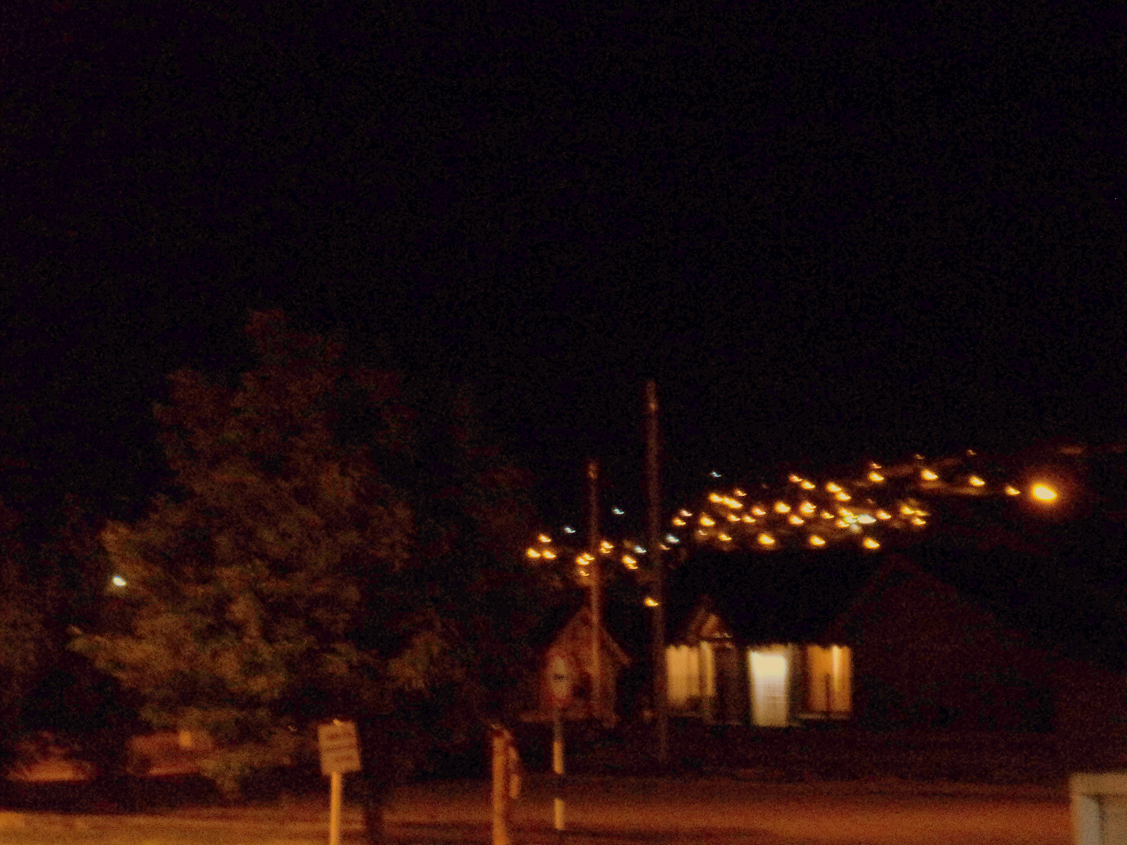 Parte de la ciudad de Esquel de noche, nótese su geografía en desnivel